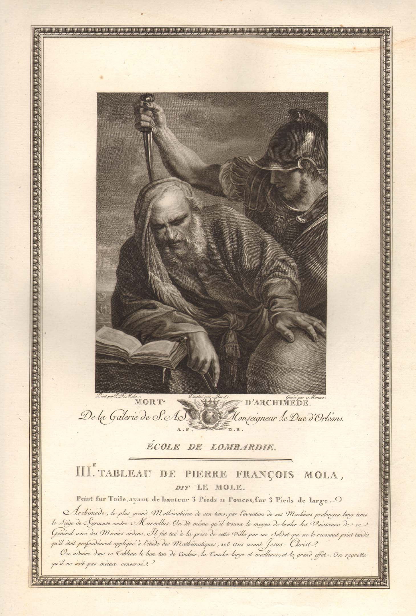 Incisione originale all’acquaforte da un soggetto di Francesco Mola proveniente dalla raccolta dal titolo “Galerie du Palais Royal gravée d’après les Tableaux del differentes Ecoles qui la composent…..dediée à S.A.S. Le Duc d’Orleans” pubblicata a Parigi a cura di Couché e Bouilliard nel 1786. mm: 416 x 286